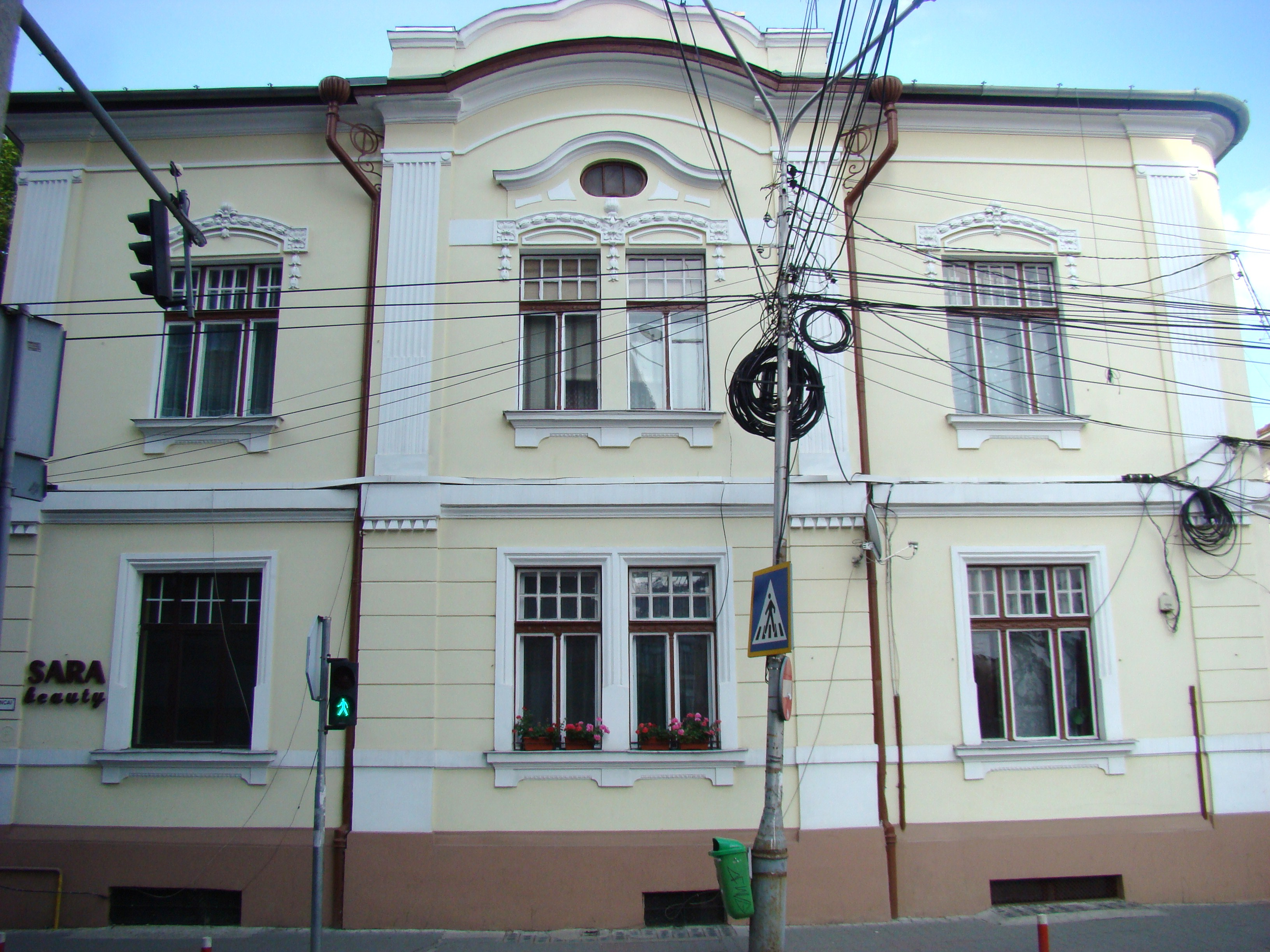 Clădire monument istoric, str. Gheorghe Șincai, nr.17